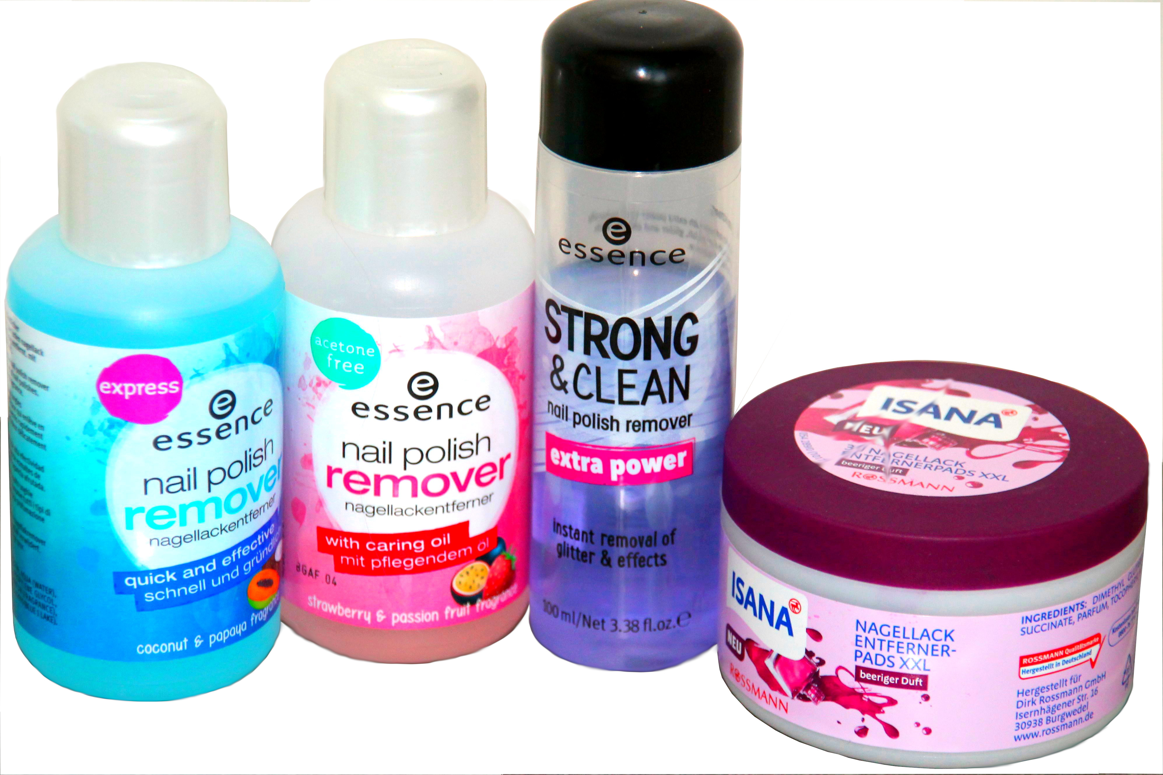 verschiedene Handelsformen von Nagellackentfernern